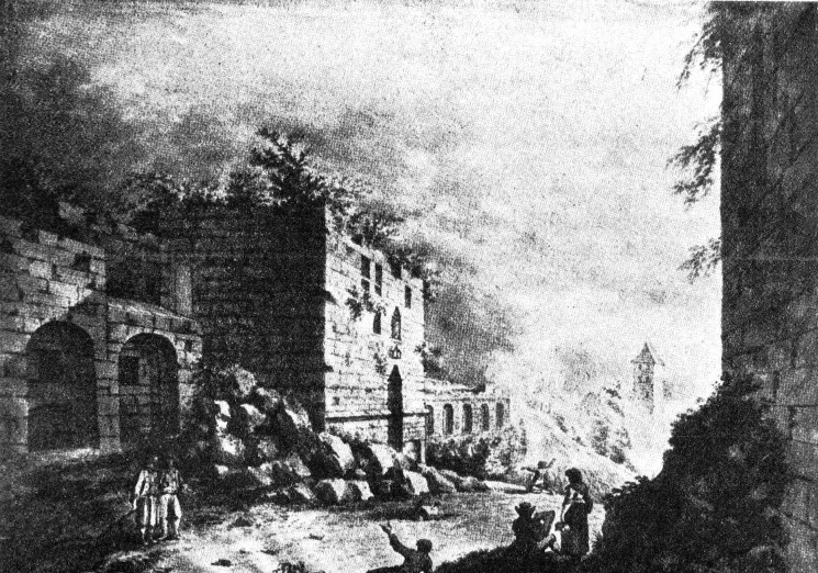 Das Bergtor ist ein ehemaliges Stadttor des äußeren Ringes der Stadt Aachen